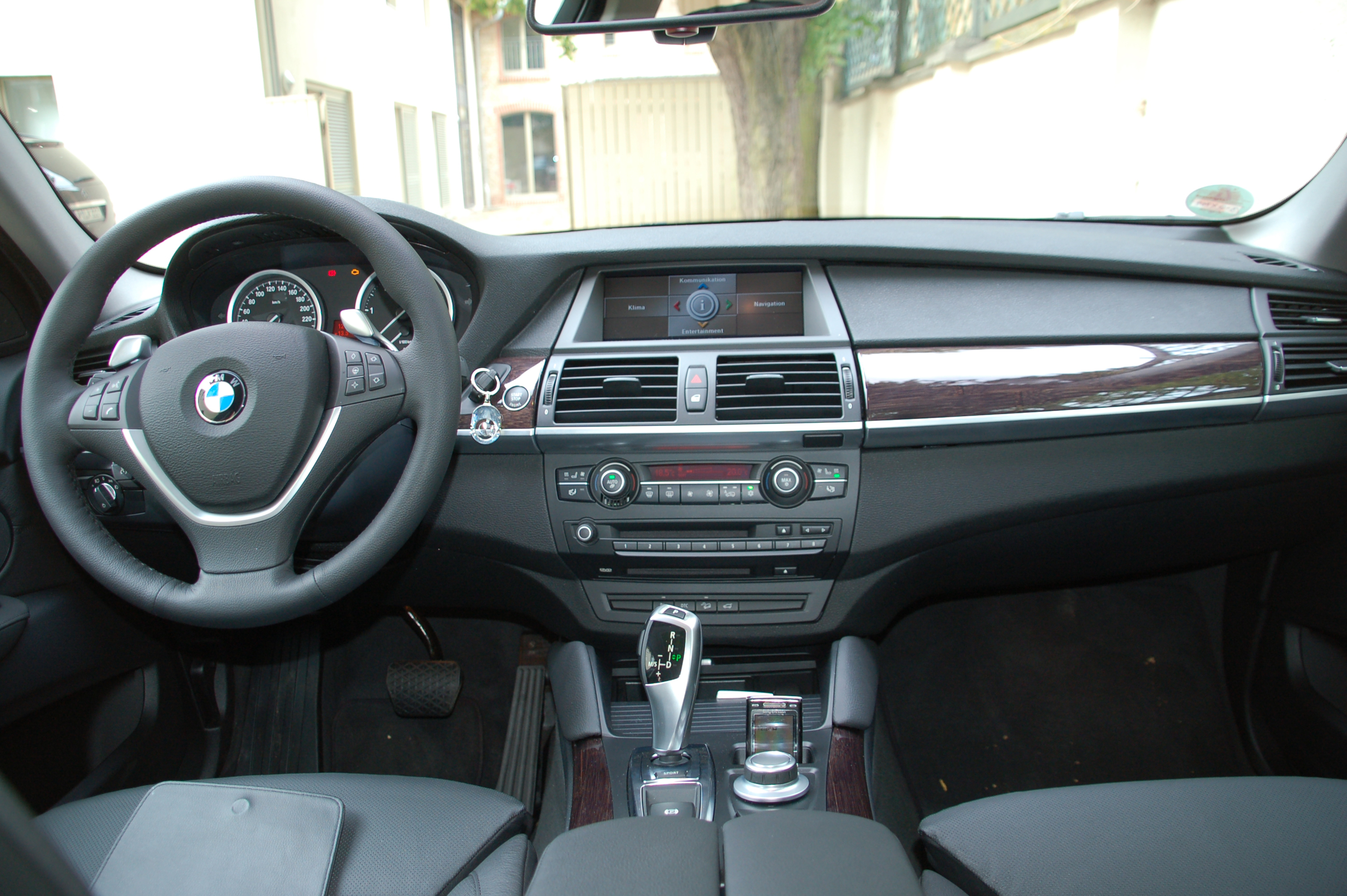 BMW X6